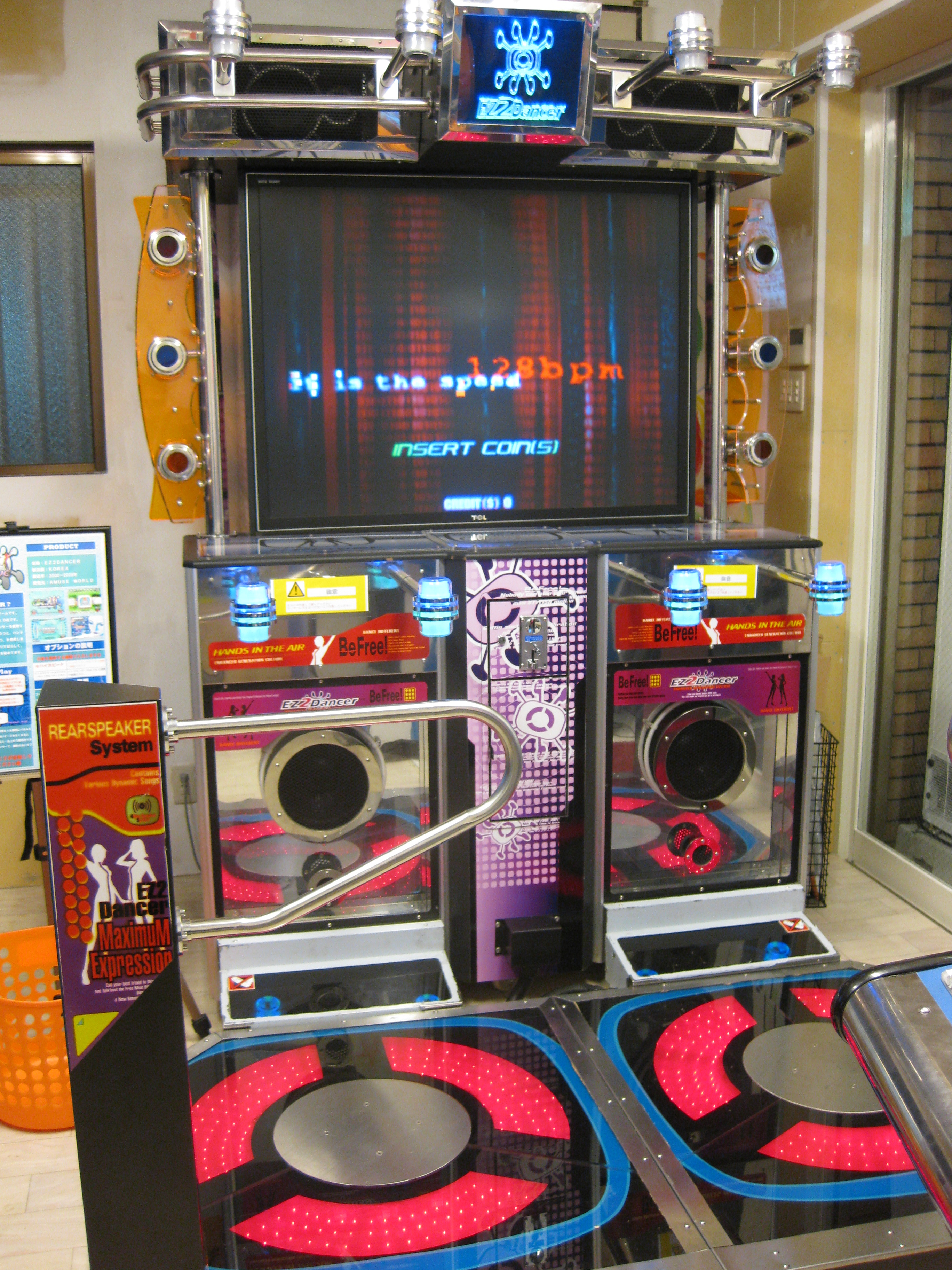 ＥＺ２ダンサーの筐体参考写真